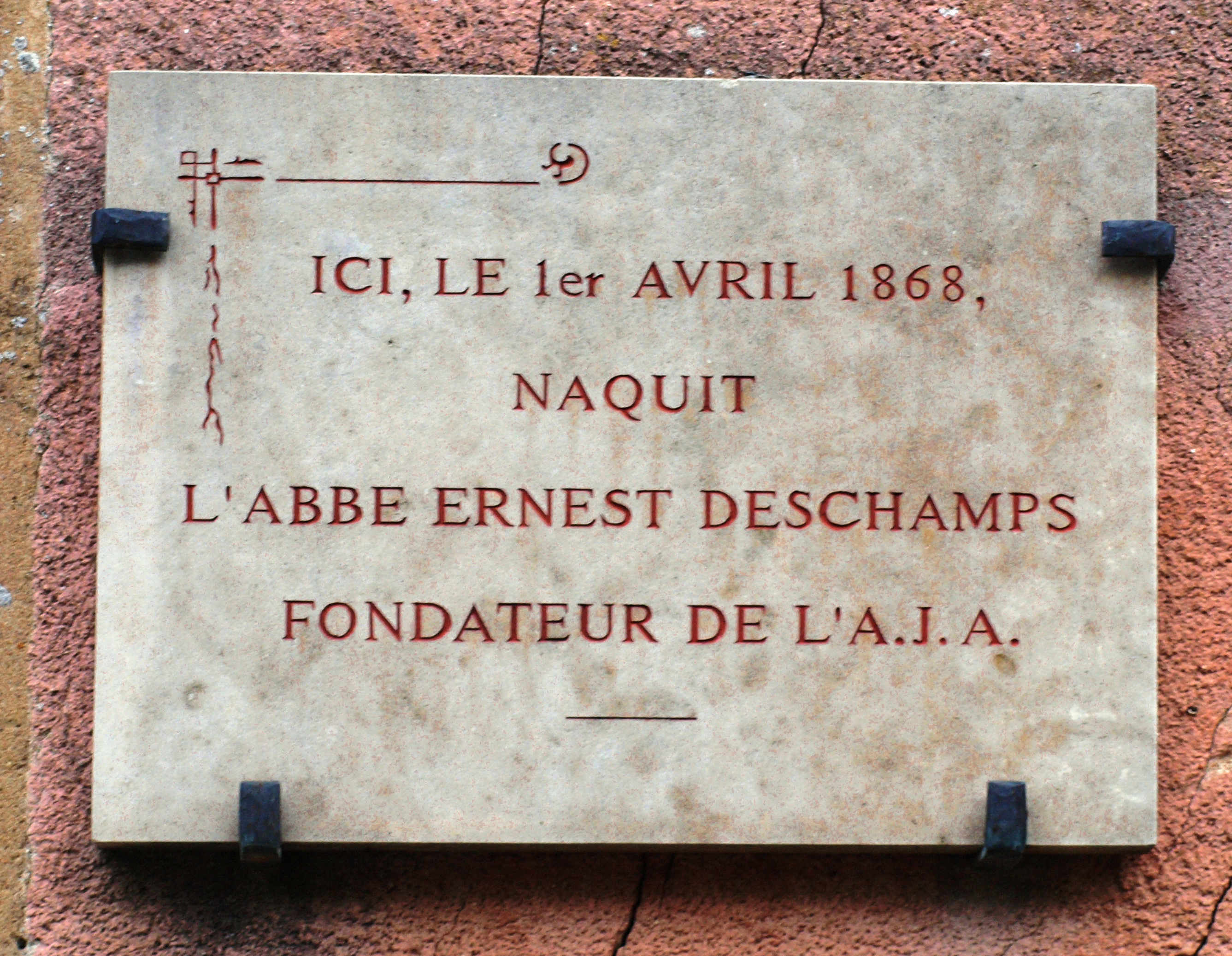 Villiers-sur-Tholon (Yonne, France) ; plaque commémorative du lieu de naissance de Ernest-Théodore Valentin Deschamps